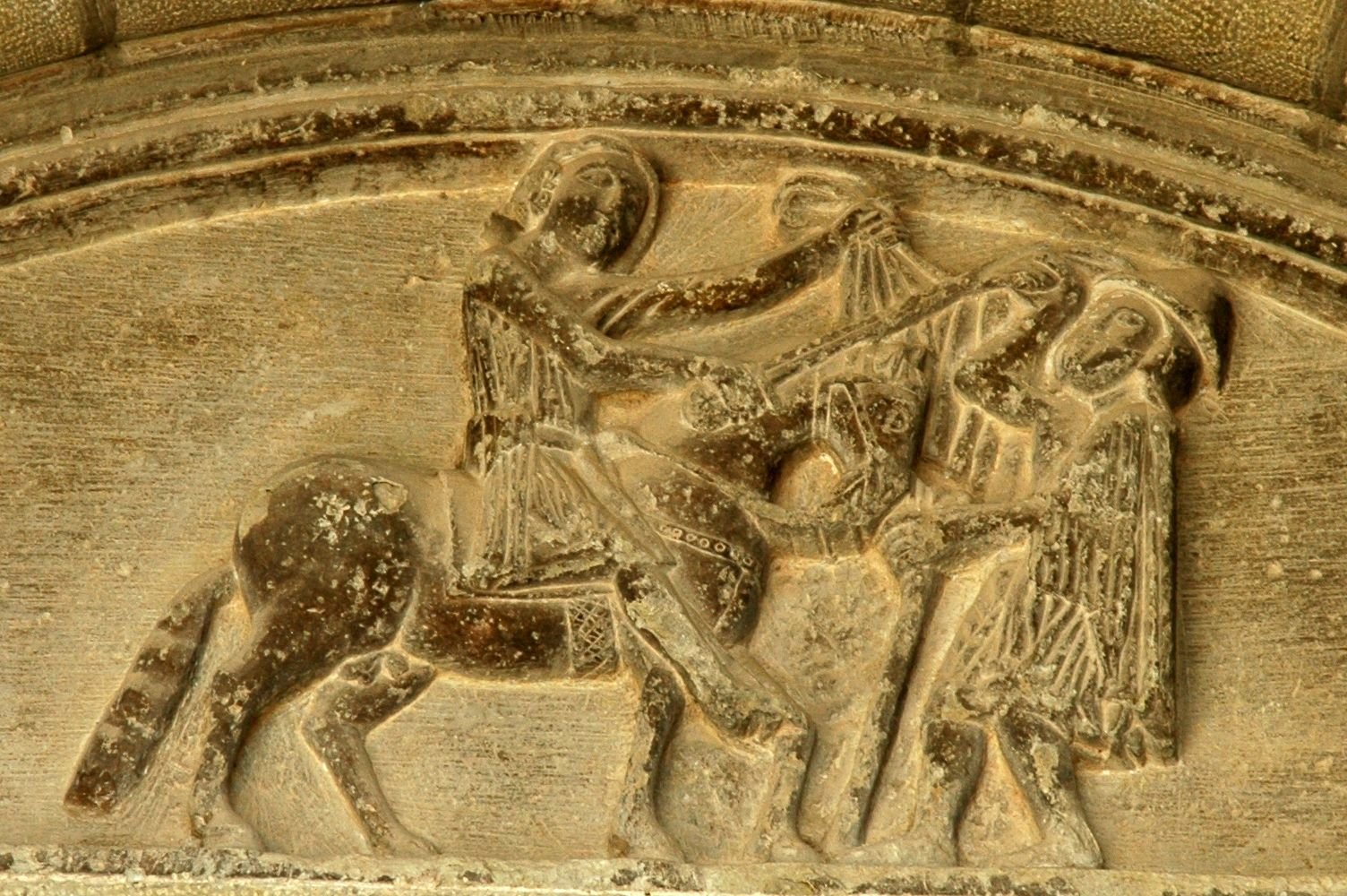 Timpà de la porta de l'antiga església romànica de Sant Martí, actualment part de l'església gòtica de Santa Maria de Cervera